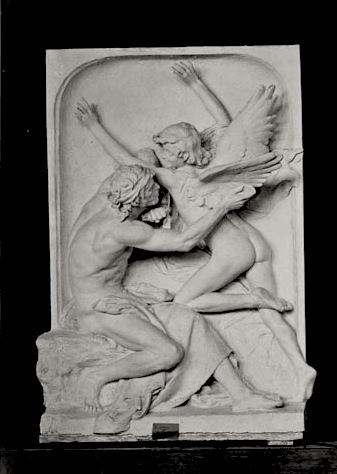 "Dédale et Icare", bas-relief, plâtre par feu Edmond Grasset, No 3942, présenté hors concours (1881)